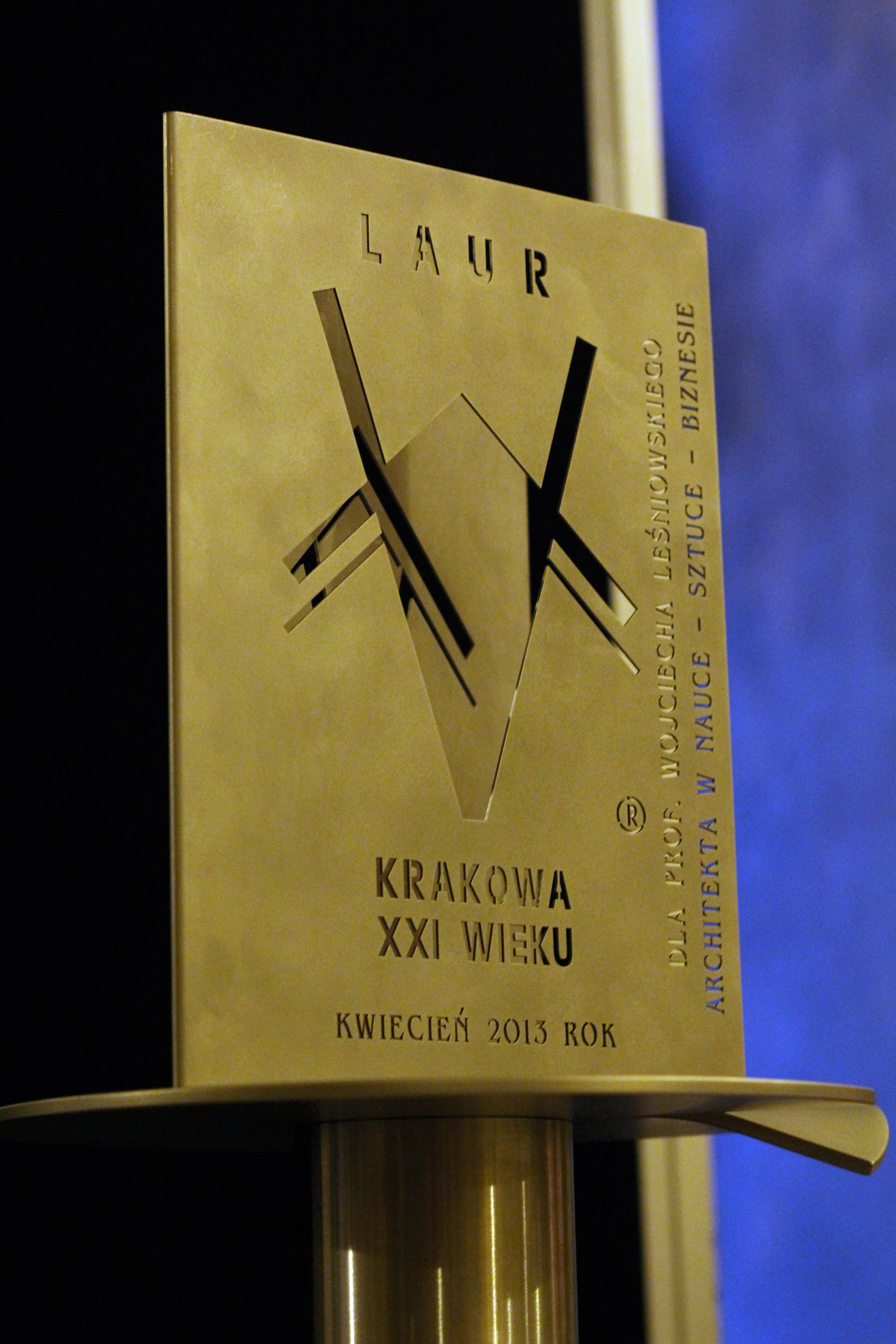 Statuetka Lauru Krakowa XXI wieku dla Wojciecha Leśnikowskiego autorstwa Anny Zabdyr-Jamróz.